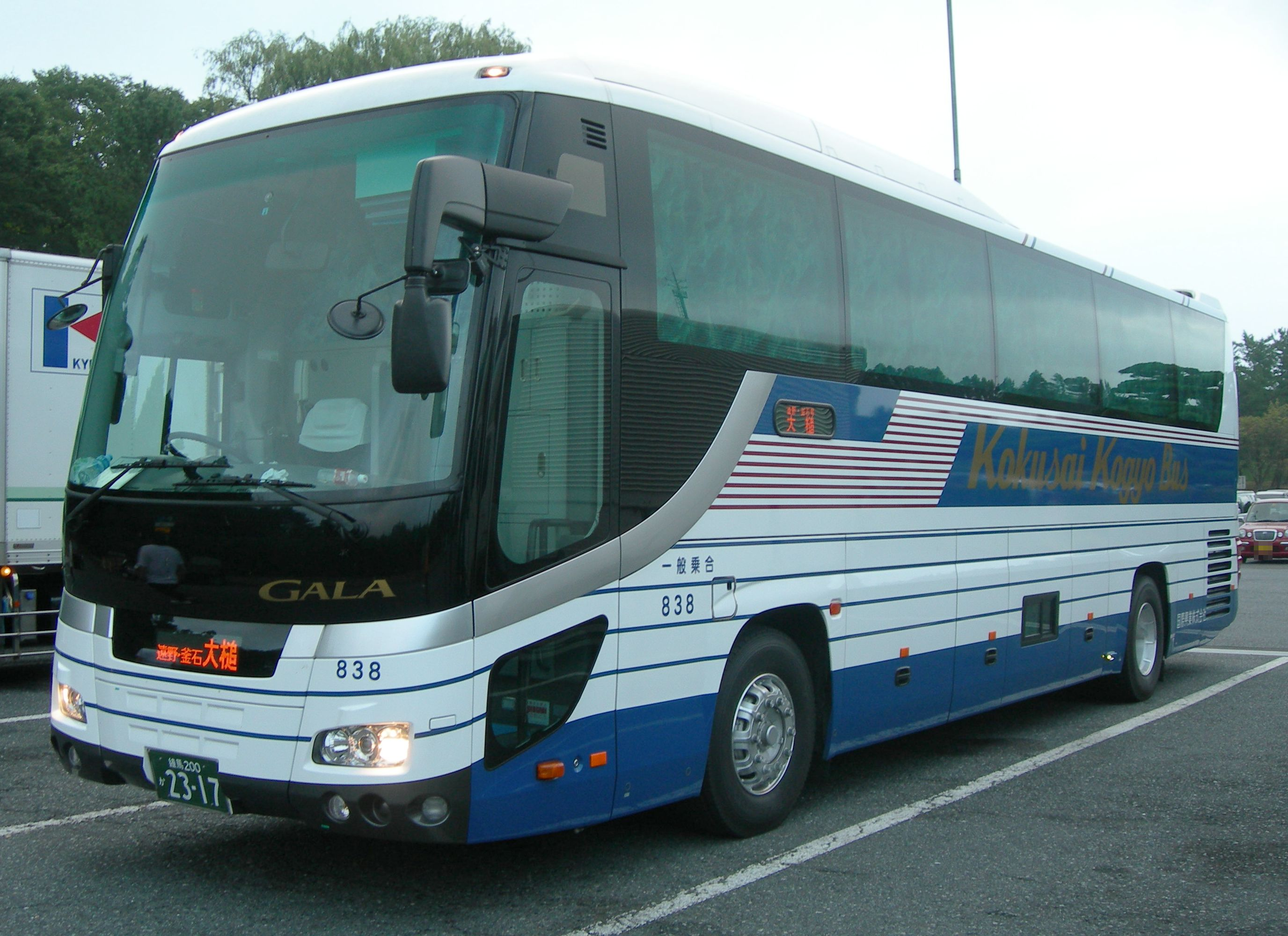 国際興業バス 遠野・釜石号